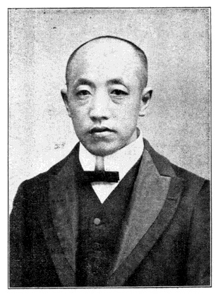 中華民國國會議員